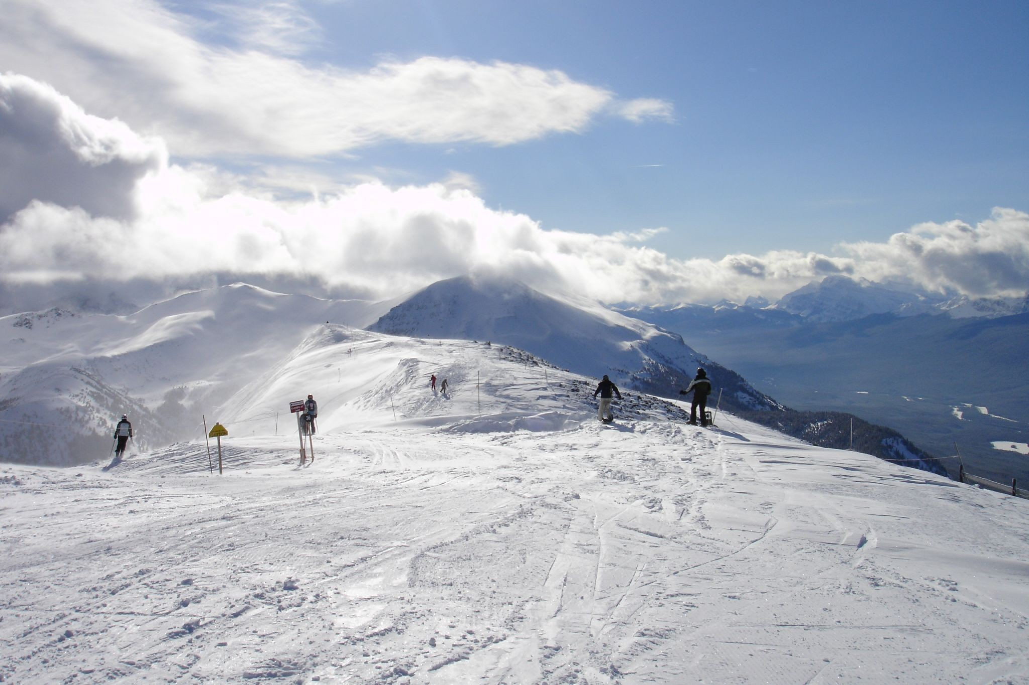 Skiing at Lake Louise.